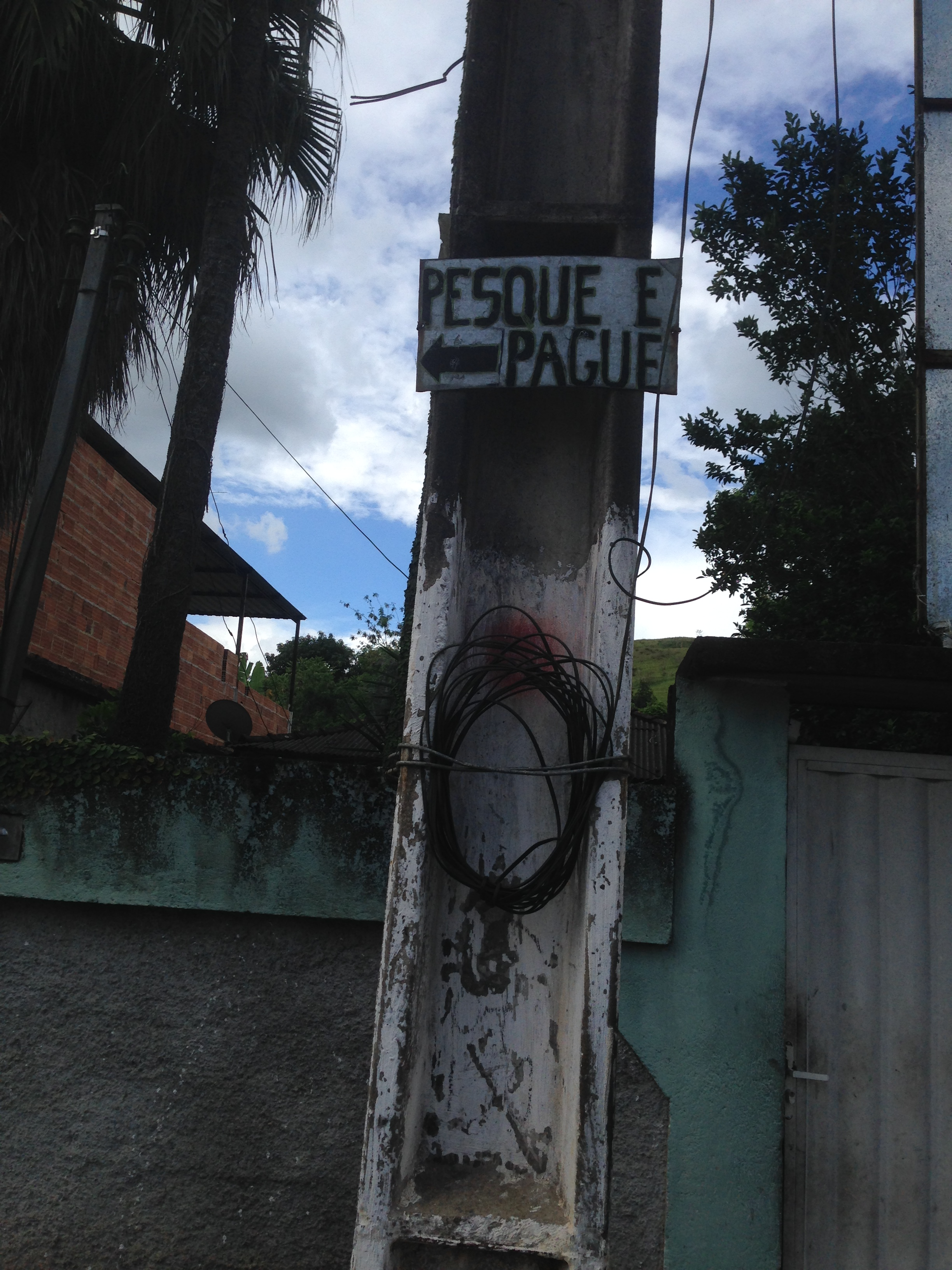 Indicação de caminho para pesque e pague em Vila Recreio, Magé, 2019